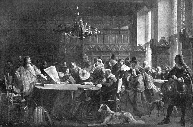 Westfälischer Friede: Der brandenburgische Abgesandte Graf zu Sayn-Wittgenstein vertritt die Forderungen des Großen Kurfürsten. Die entscheidenden Verhandlungen um Schweden und Kurbrandenburg haben allerdings in Osnabrück stattgefunden.